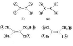 Sistema E e Z para alcenos